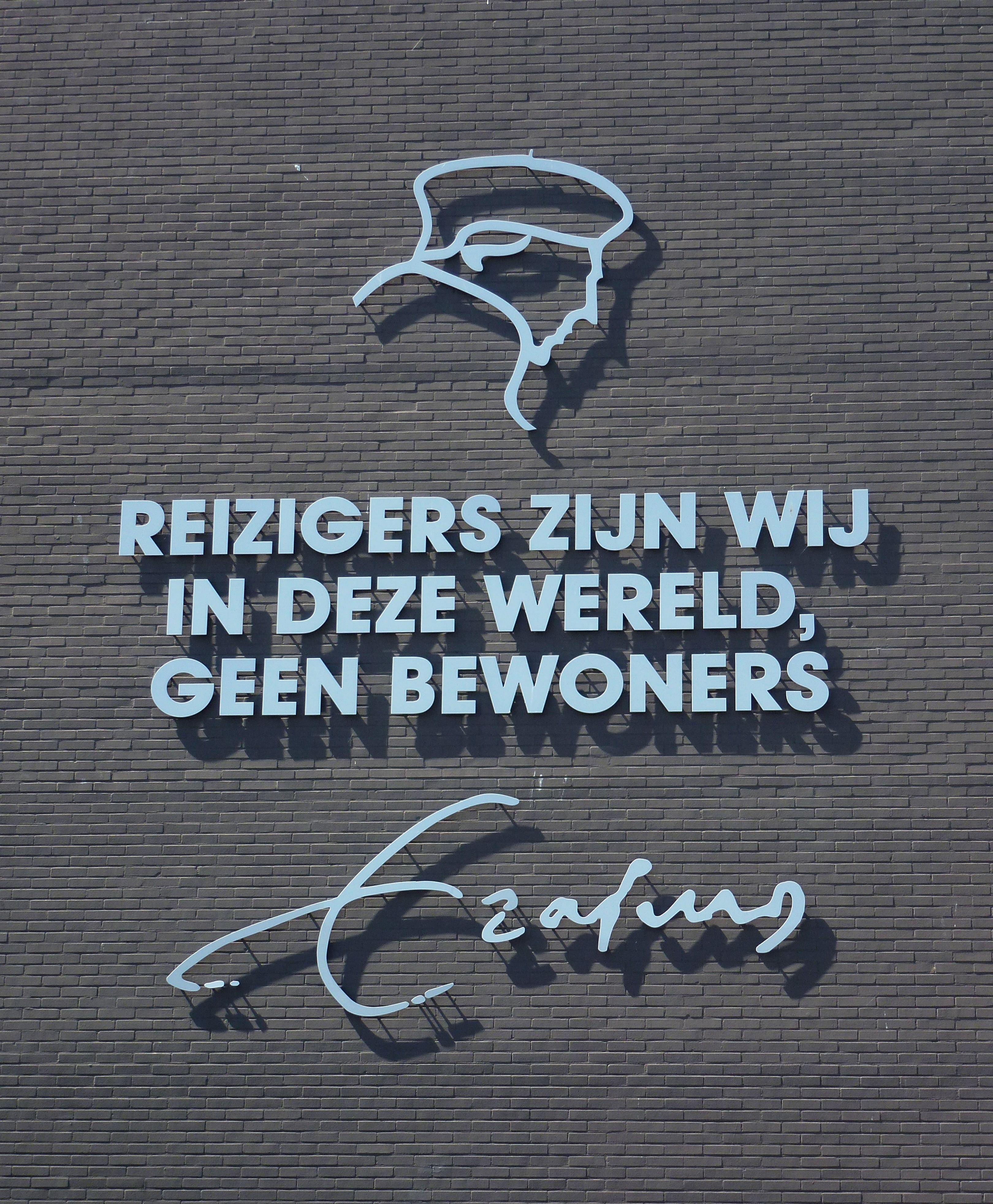 Gestileerd portret van Desiderius Erasmus en de tekst -"Reizigers zijn wij in deze wereld, geen bewoners"- aan het Erasmusplein in Gouda. Het ontwerp is van het Erasmusgenootschap in Gouda. Onthulling van het relief in 2013??? De tekst komt uit het boek "Voorbereiding op de dood" geschreven door Erasmus.